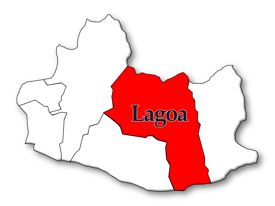 Censos 1864/2011